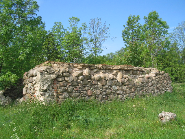 Gedminaičių dvaro liekanos, Šilutės raj.